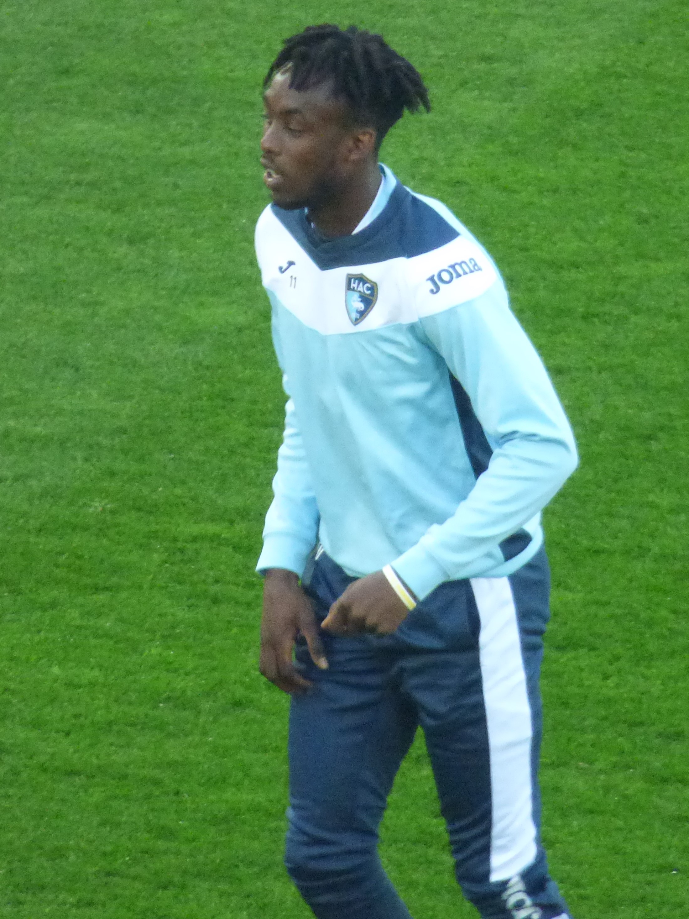 Tino Kadewere avant le match Lens / Le Havre, comptant pour la 30ème journée du championnat de France de Ligue 2 2018-2019, le 1er avril 2019 au Stade Bollaert-Delelis.